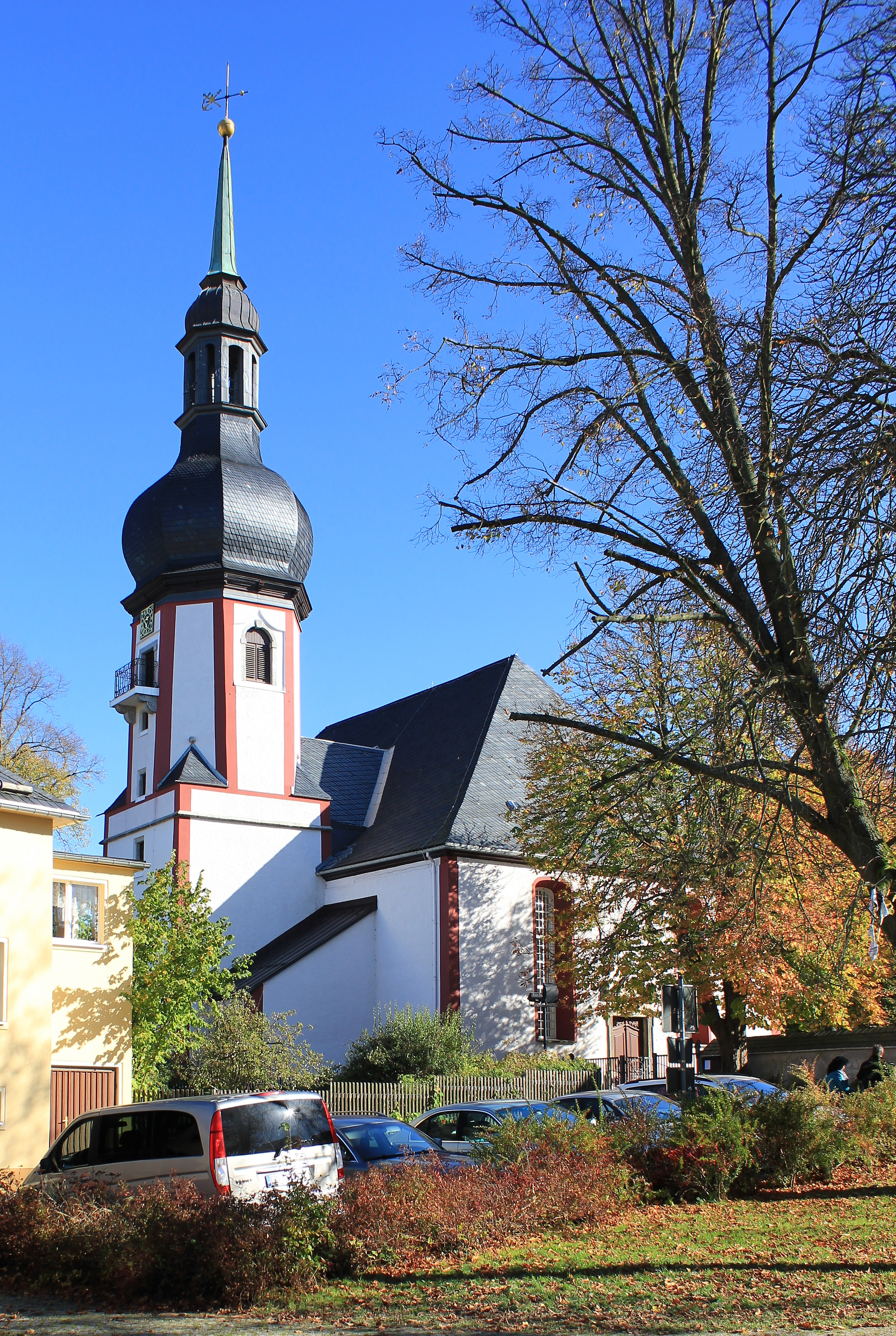 St.Trinitatis-Kirche in Zwönitz, Erzgebirgskreis, Sachsen.